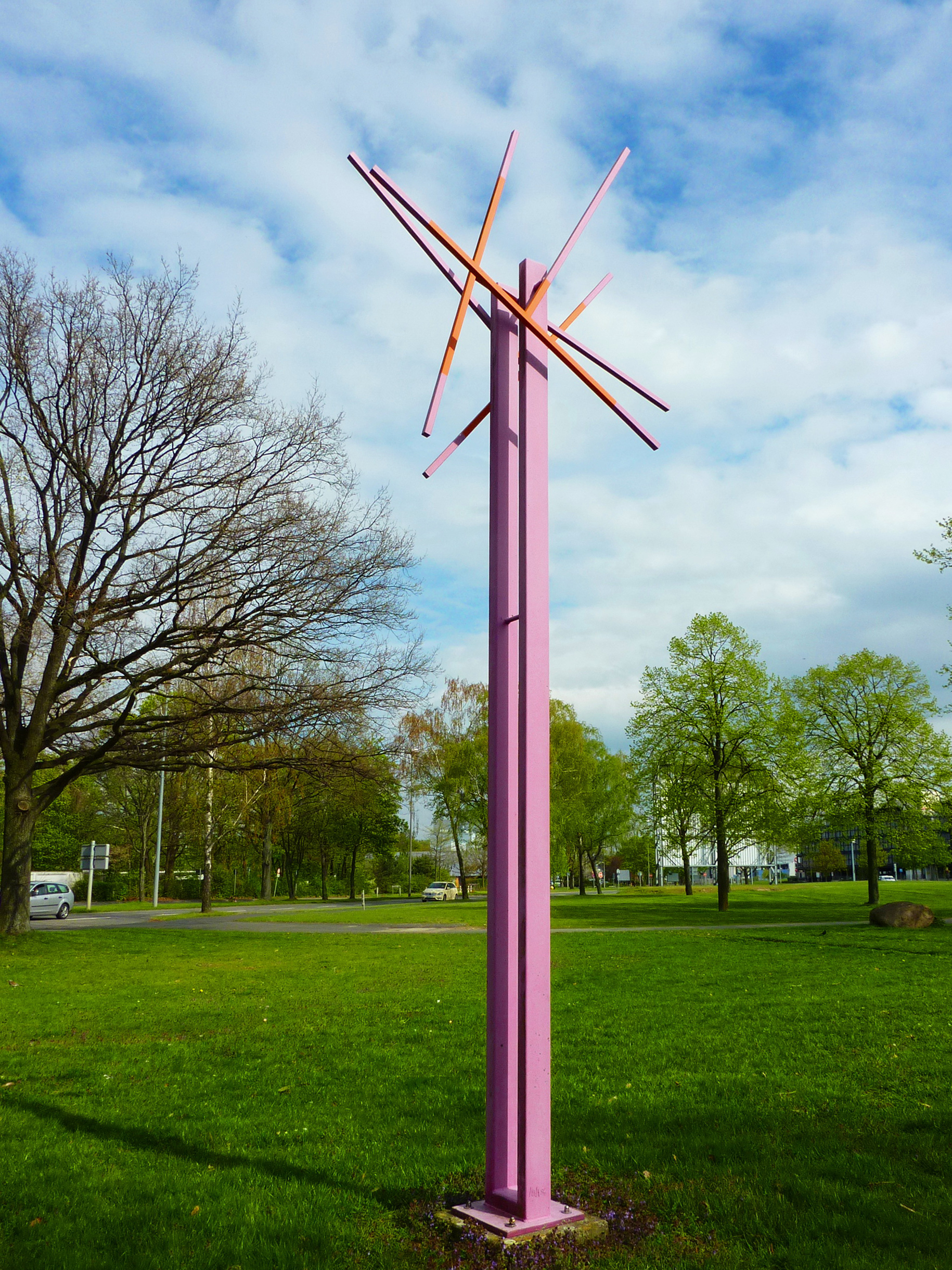 Triga, (kinetische Skulptur) von Michael Hischer, Stahl, verzinkt, Edelstahl, farbig lackiert, Standort Flughafen Langenhagen